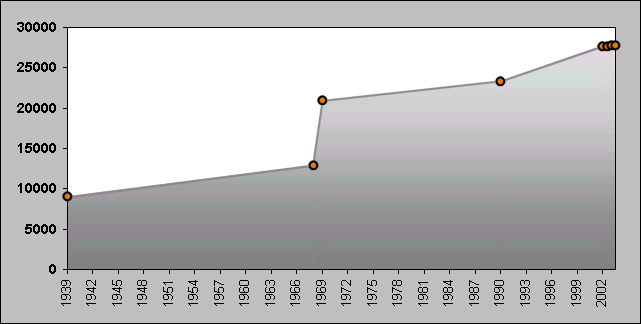 Einwohnerentwicklung Kevelaers Die Grafik wurde erstellt von Wydoi